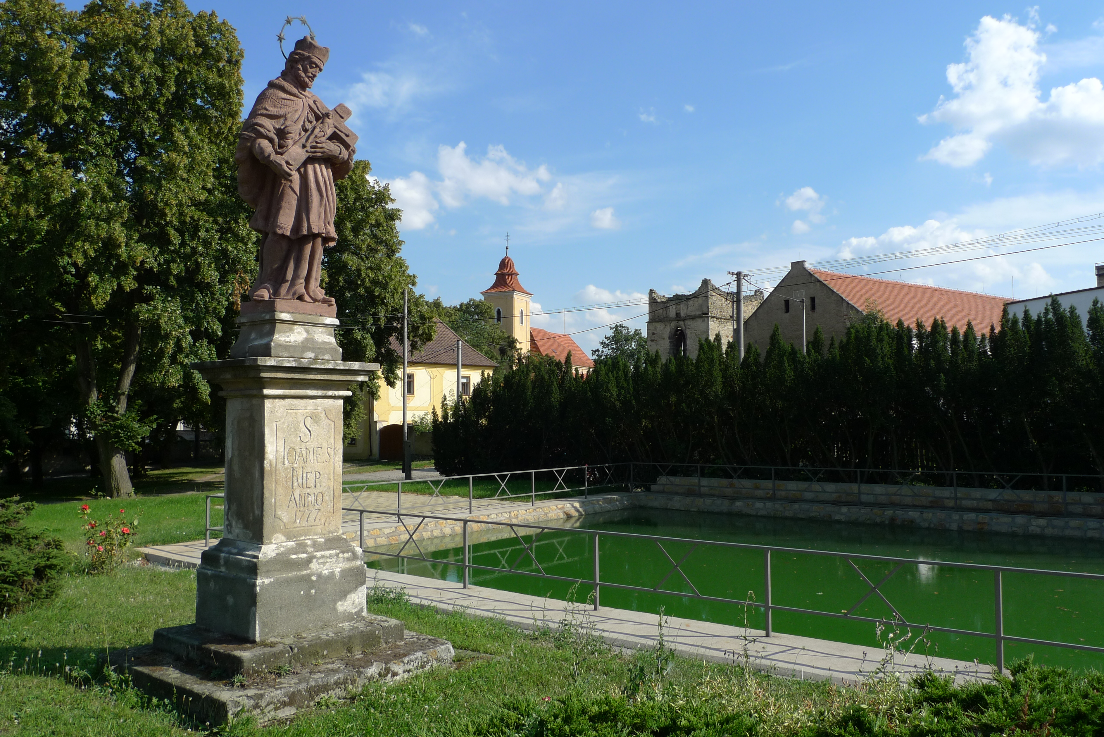 Česky: Vyšehořovice v okrese Praha-východ - centrum obce s nádrží